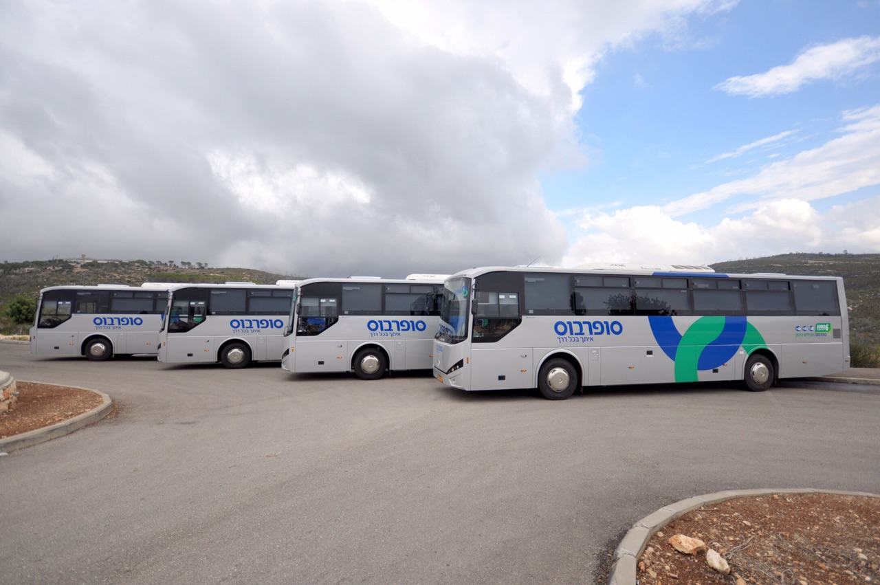 האוטובוסים החדשים של סופרבוס 2014